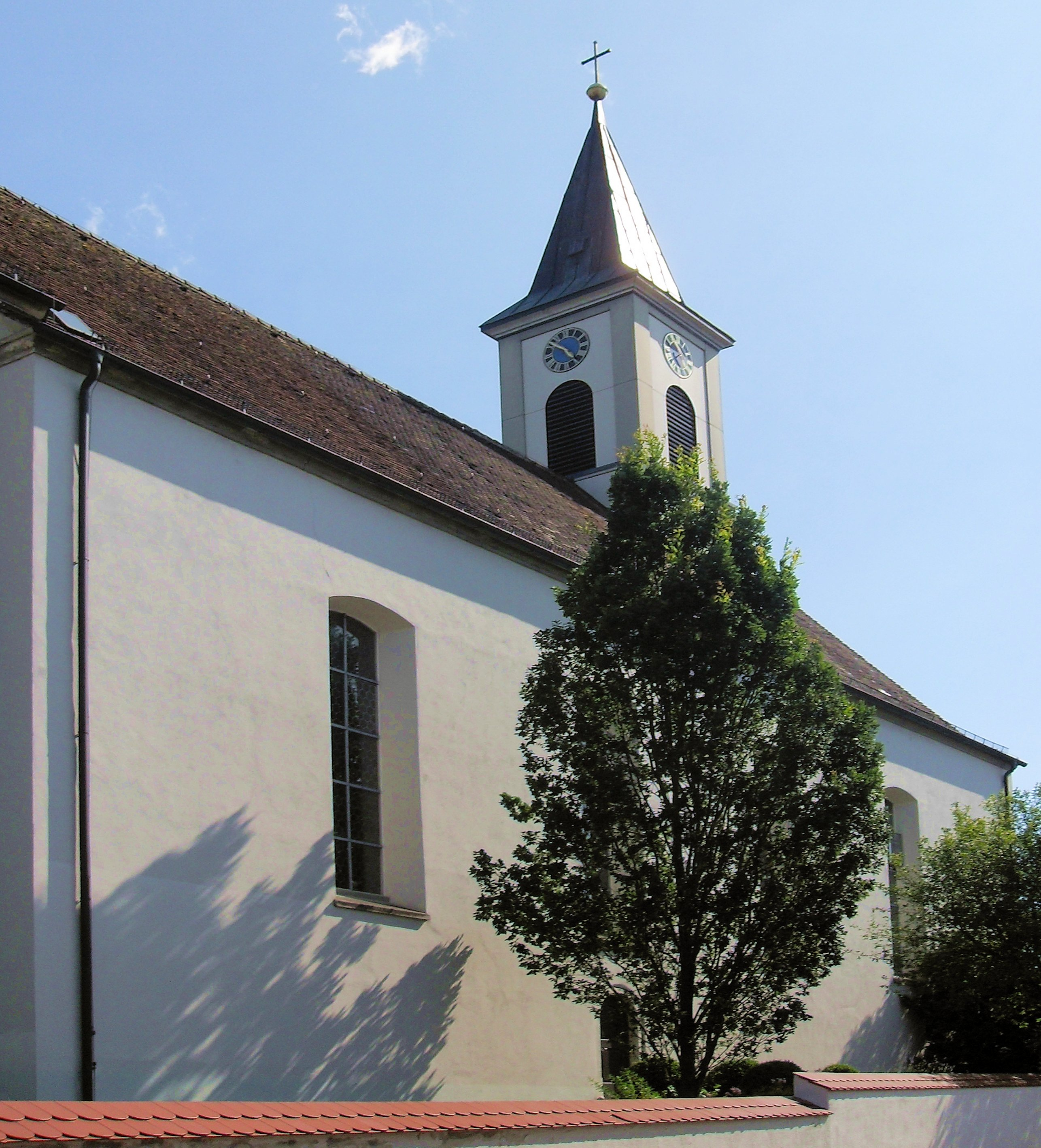 Kirche St. Ulrich in Nenzingen, Gemeinde Orsingen-Nenzingen